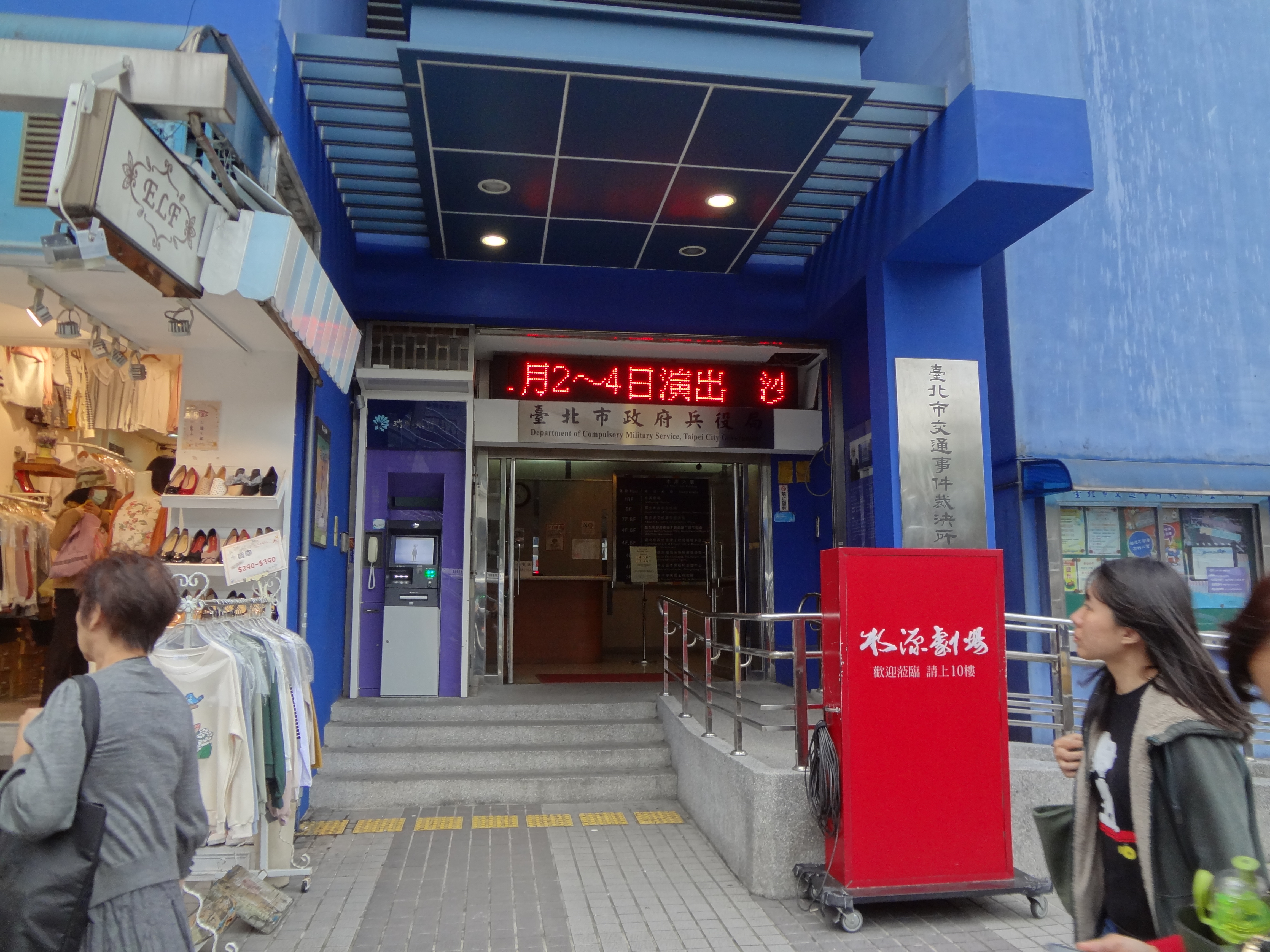 臺北市水源大樓大門。